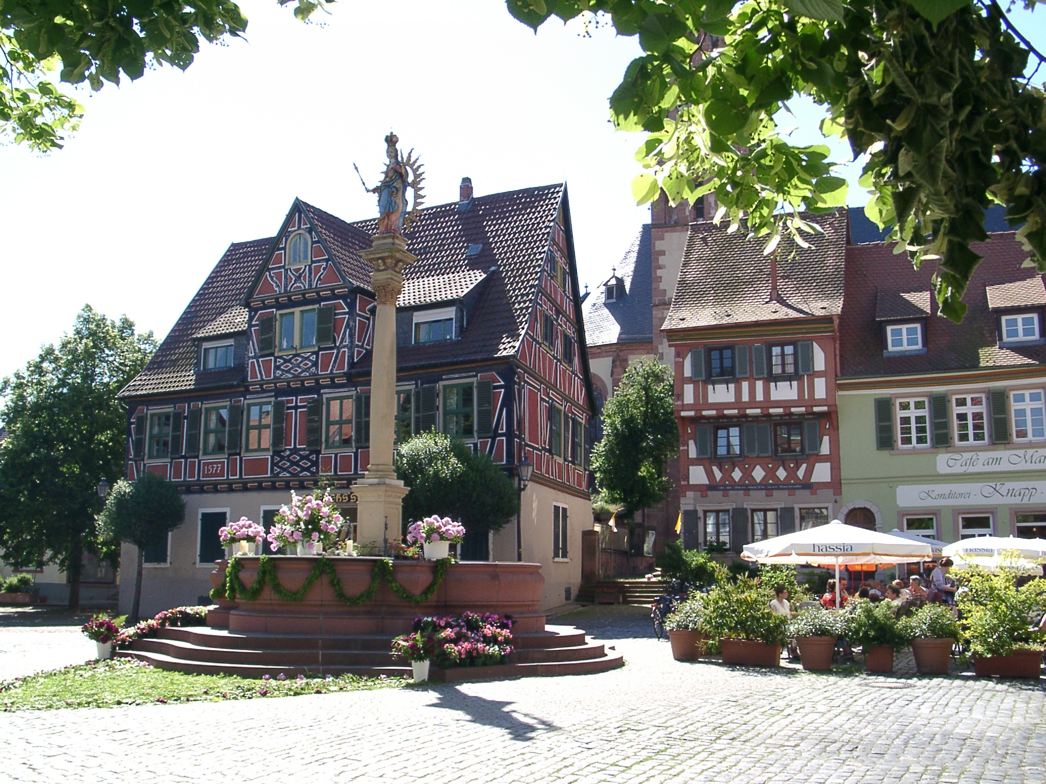 Ladenburg, Brunnen